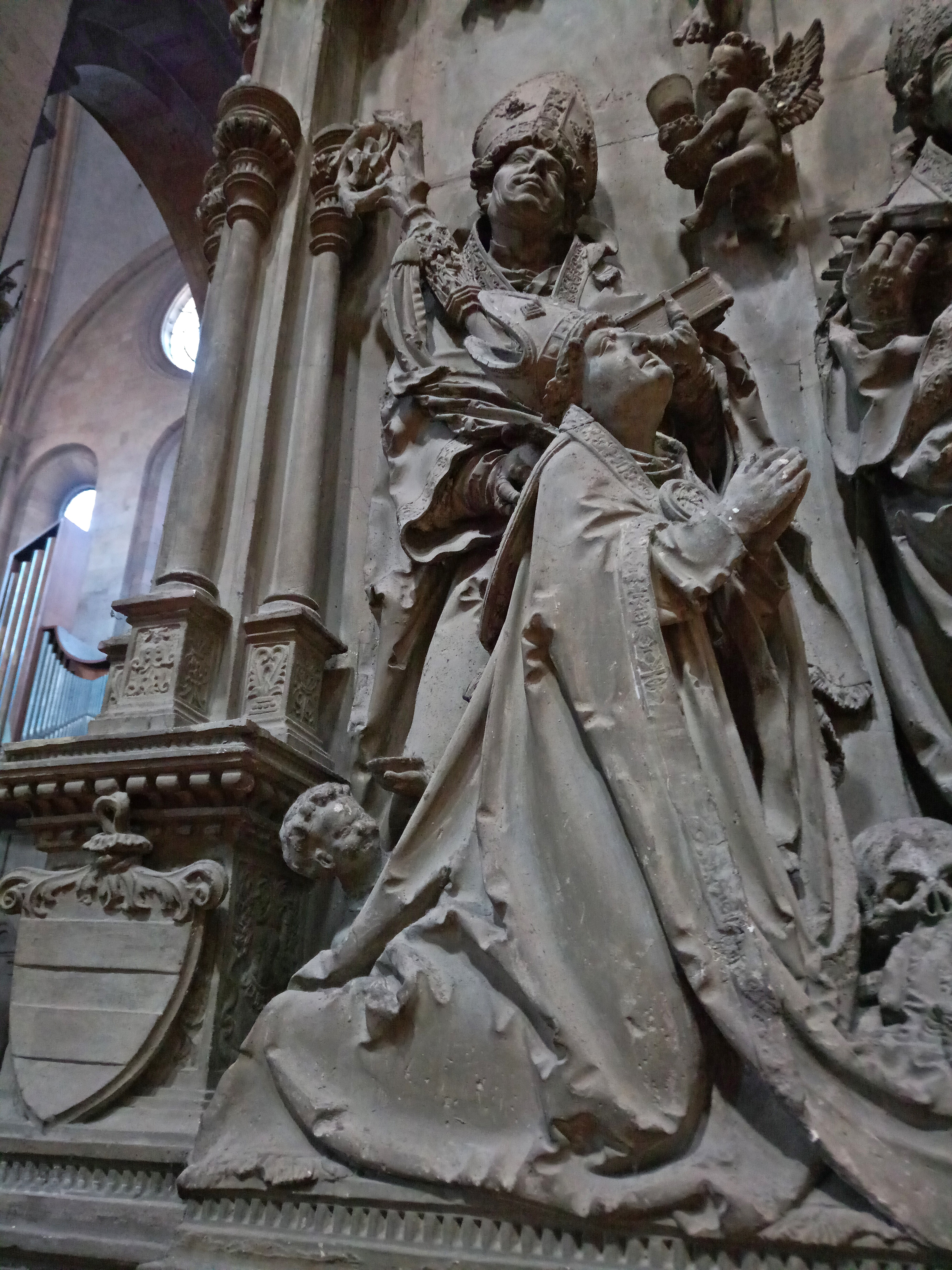 Mainzer Dom, Bischof Uriel von Gemmingen auf seinem Grabmal